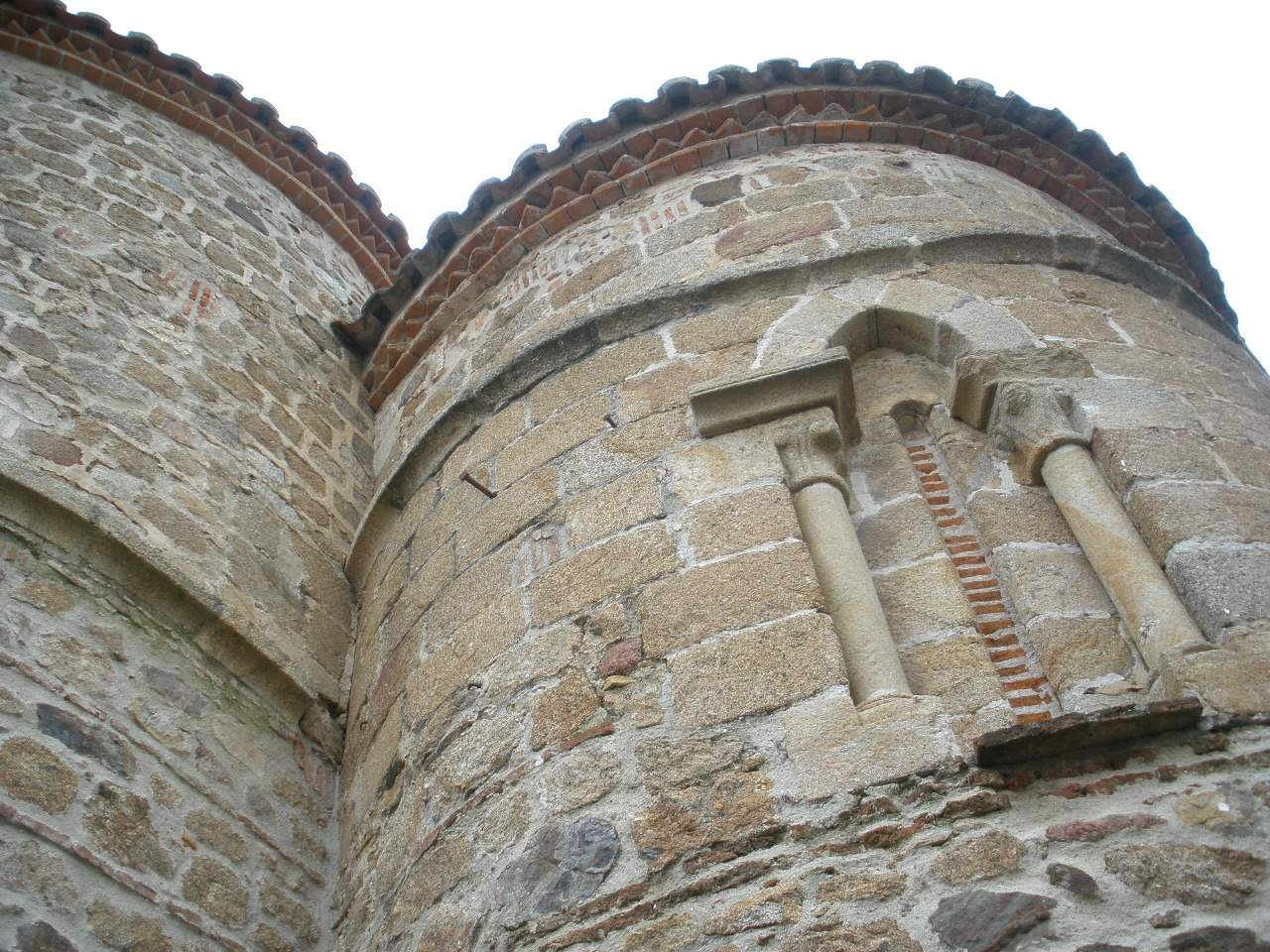 Iglesia de la Magdalena (Plasencia)